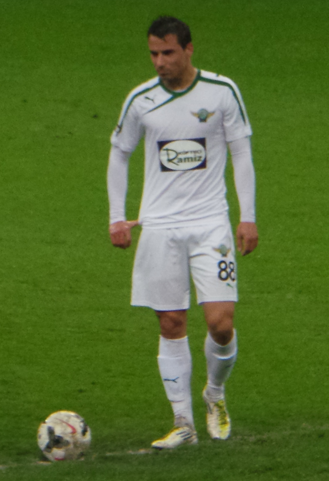 Bahattin Köse